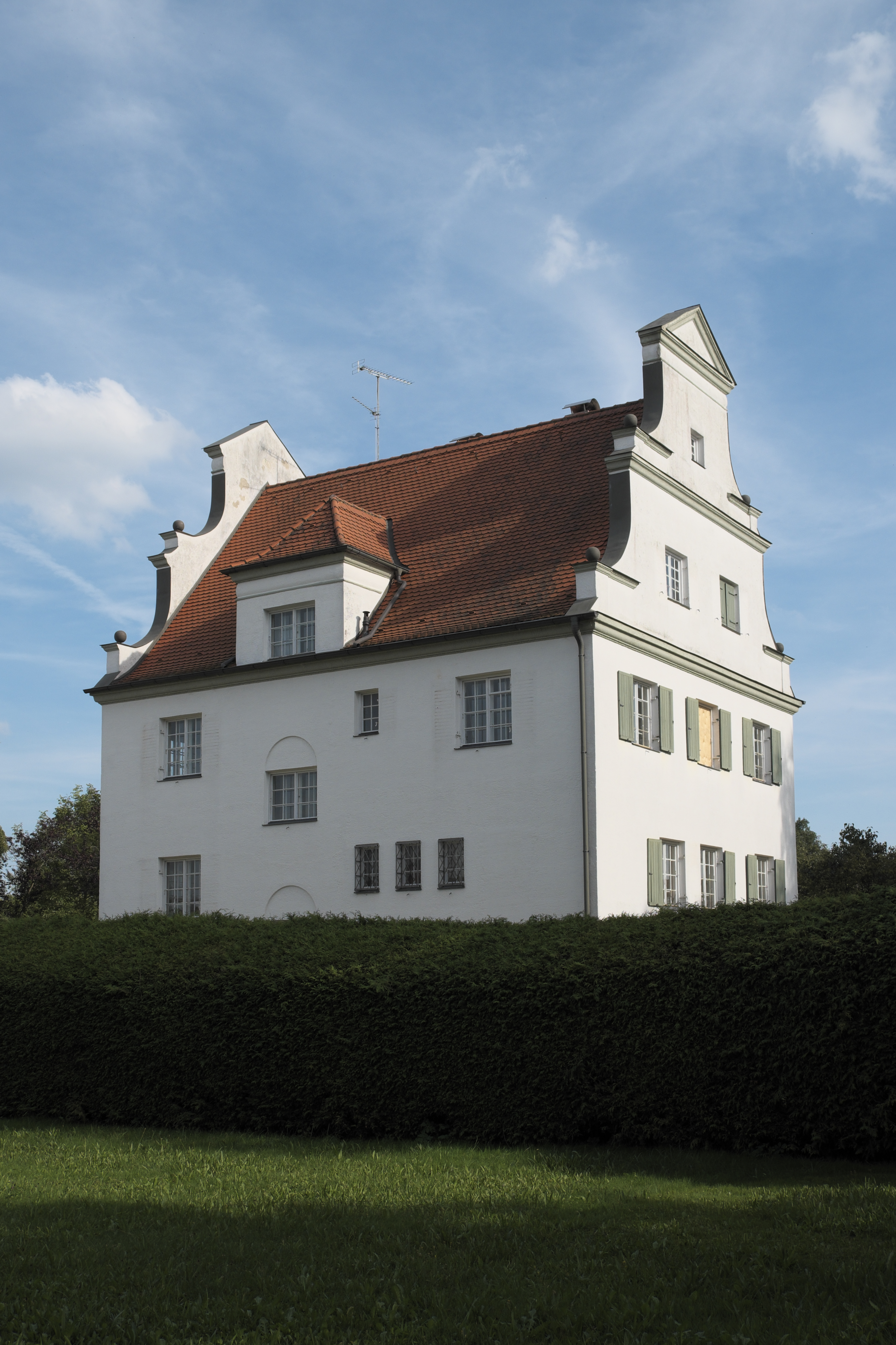 Pfarrhaus in Schwabhausen bei Landsberg, einem Ortsteil von Weil (Oberbayern) im Landkreis Landsberg am Lech (Bayern/Deutschland)